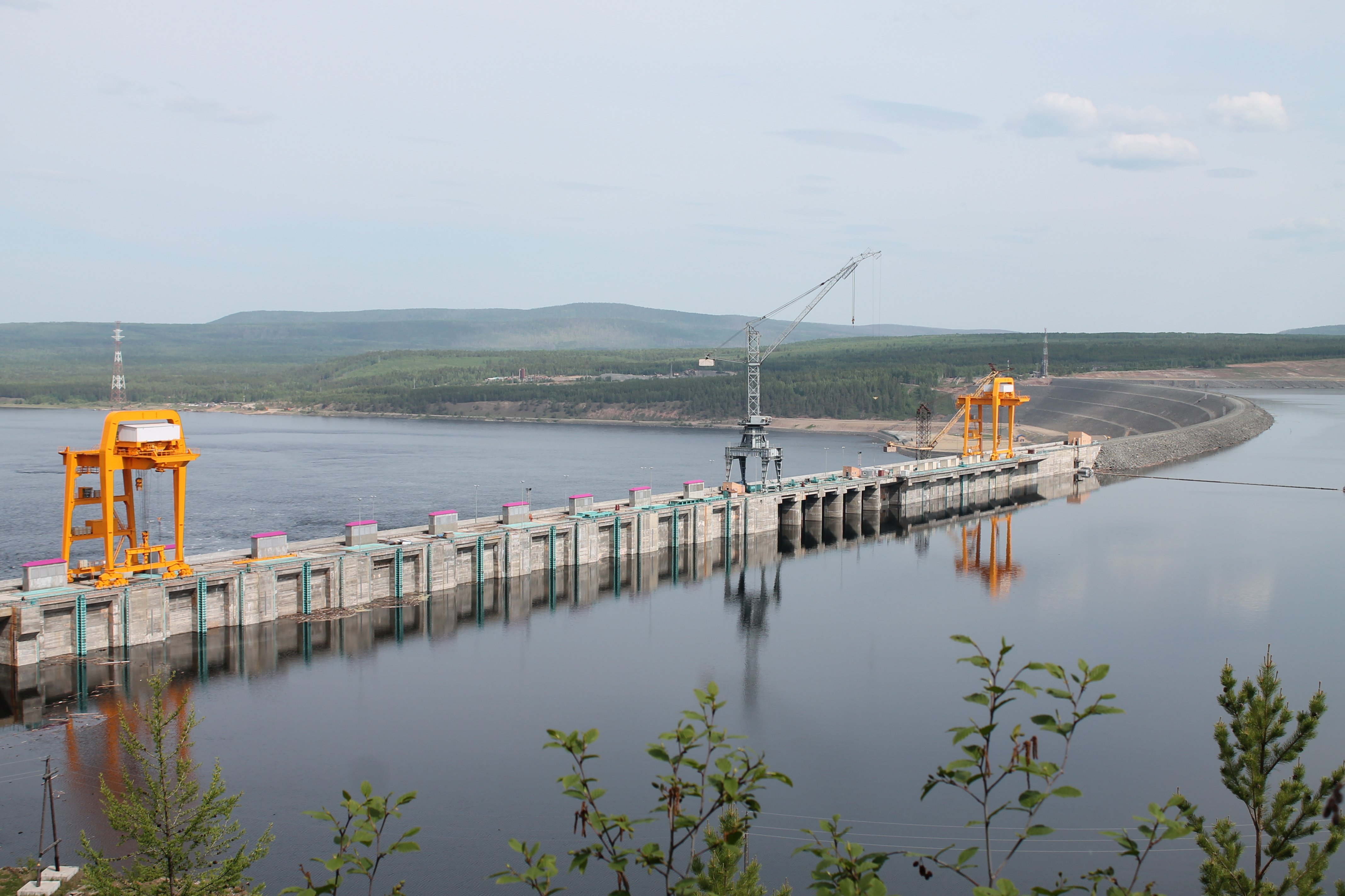 Верхний бьеф Богучанской ГЭС